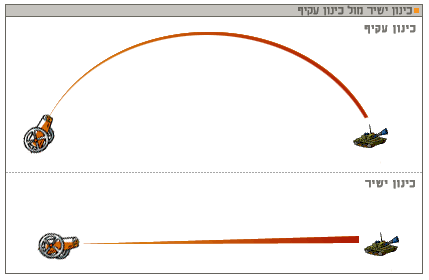 ההבדלים בין כינון ישיר ועקיף